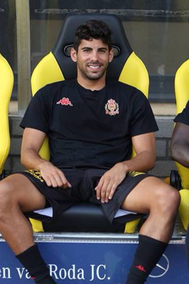 liroy Zhairi Mechelen KV Belgium 2013